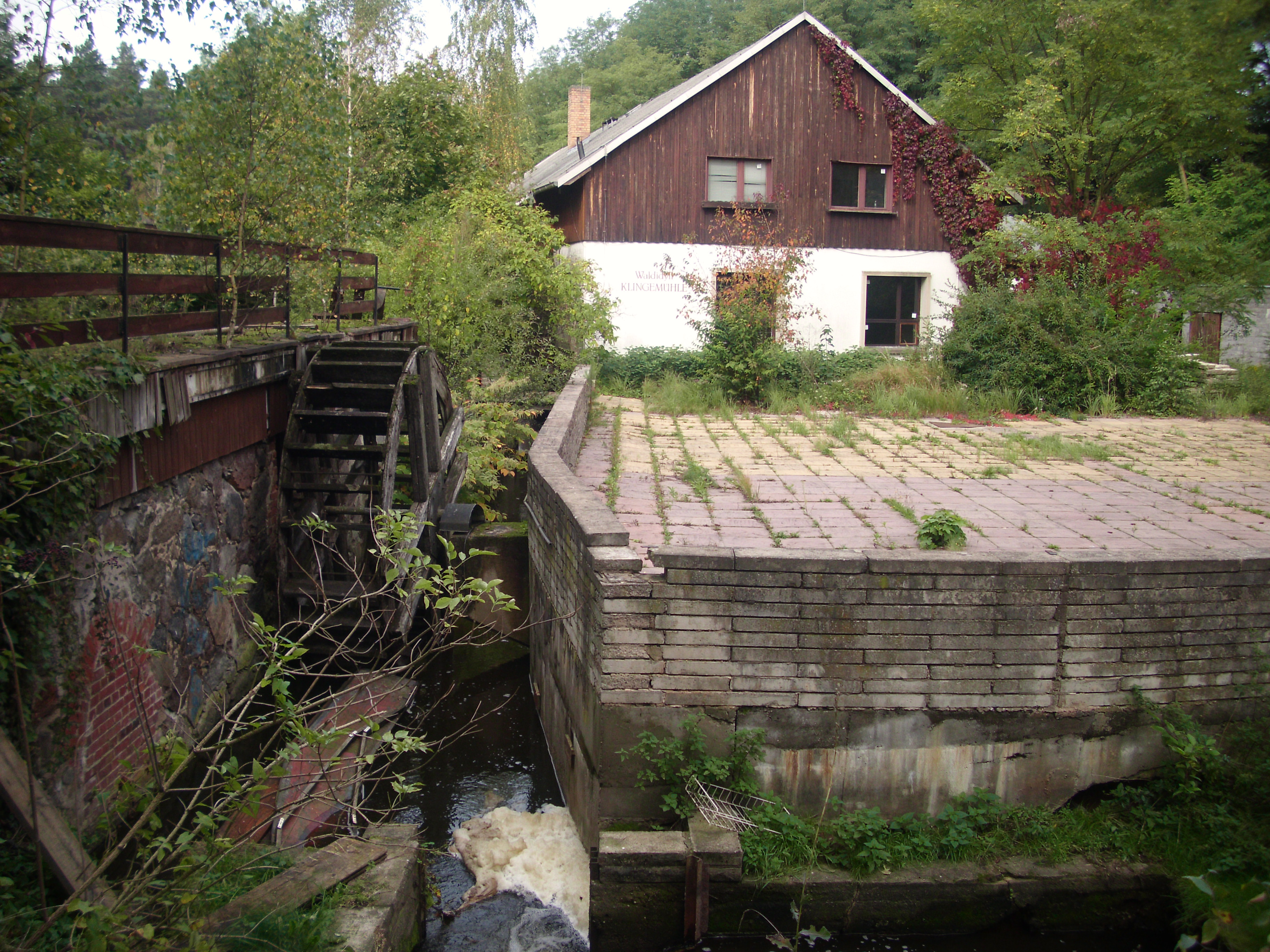 Klingemühle, Friedland im Naturpark Schlaubetal, Brandenburg